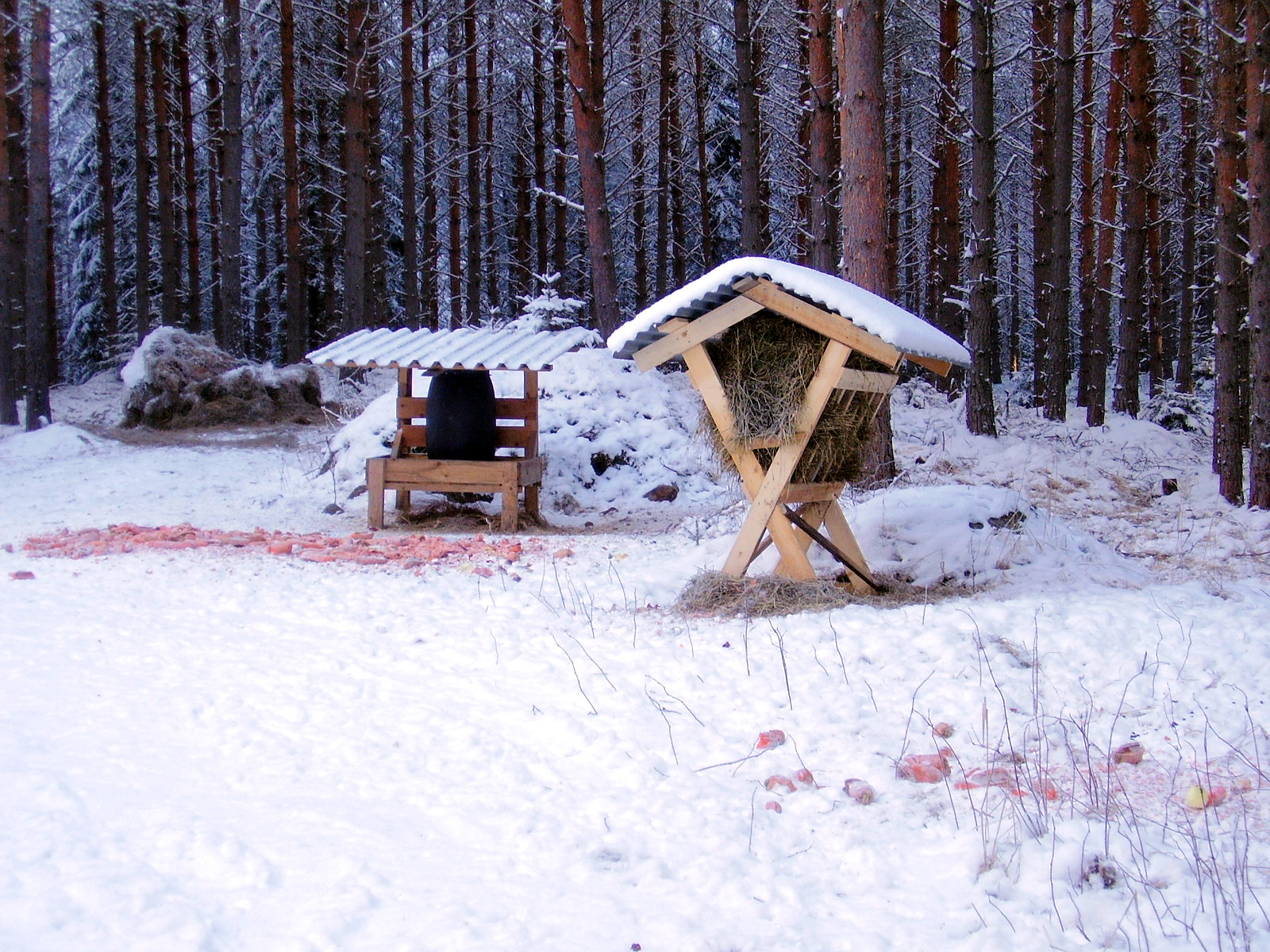 Valkohäntäpeurojen ruokintapaikka.